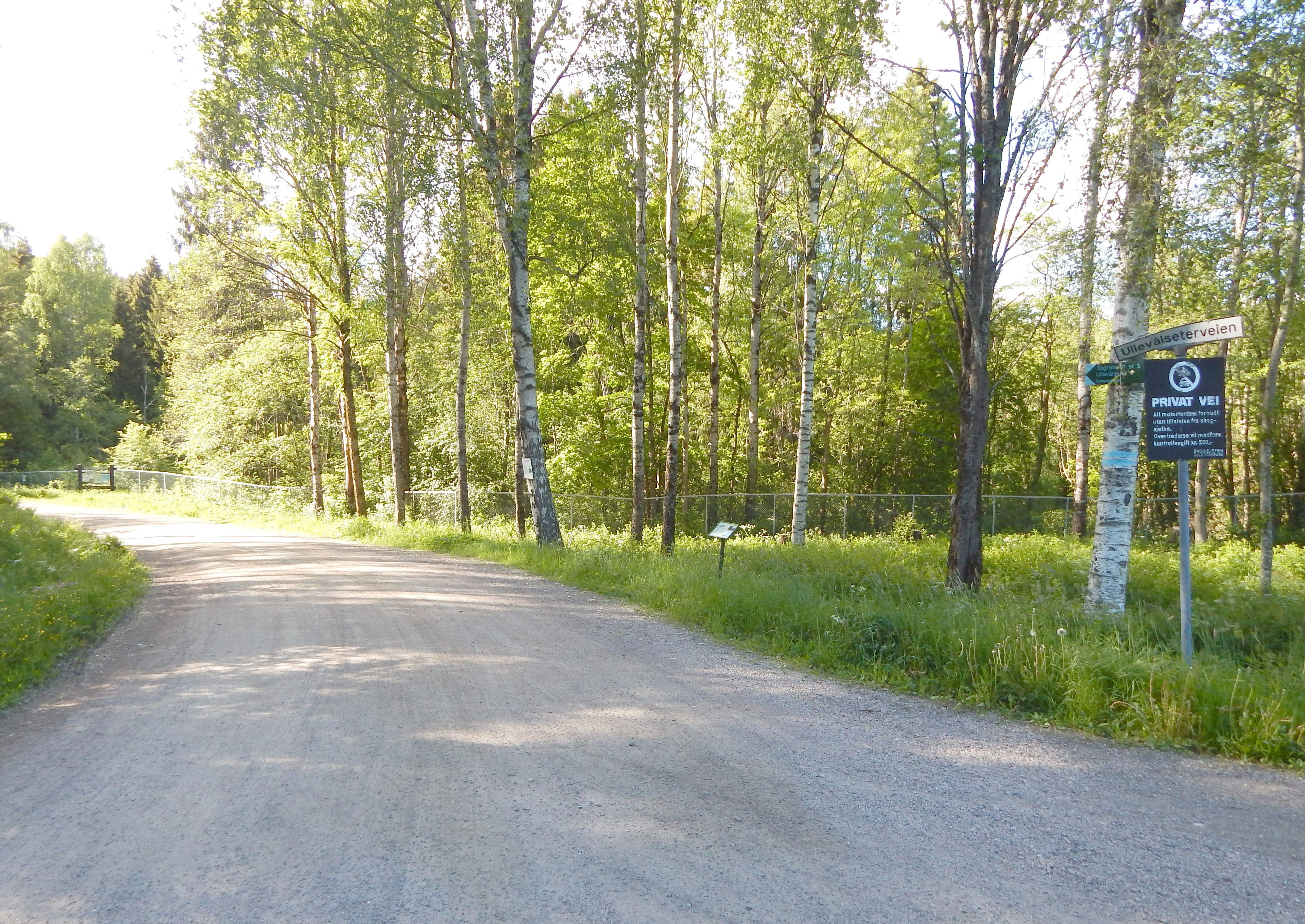 Ullevålseterveien